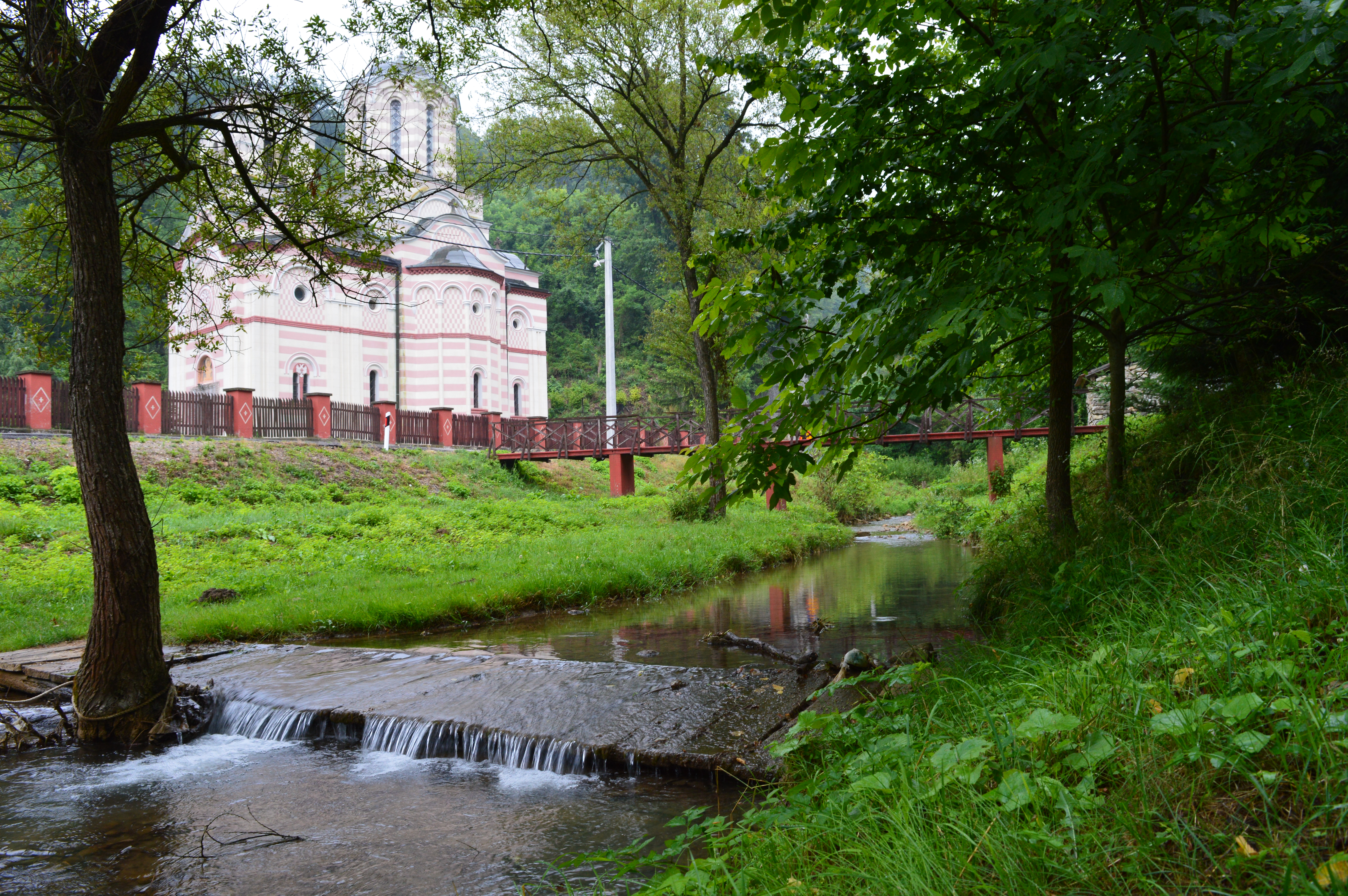 Ово је фотографија заштићеног природног добра у Србији под шифром: СП250This is a a photo of a natural area in Serbia with ID: СП250 Споменик природе Бигрена акумулација код манастира Тумане